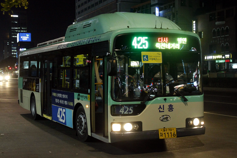 대구시내버스 425번 저상버스